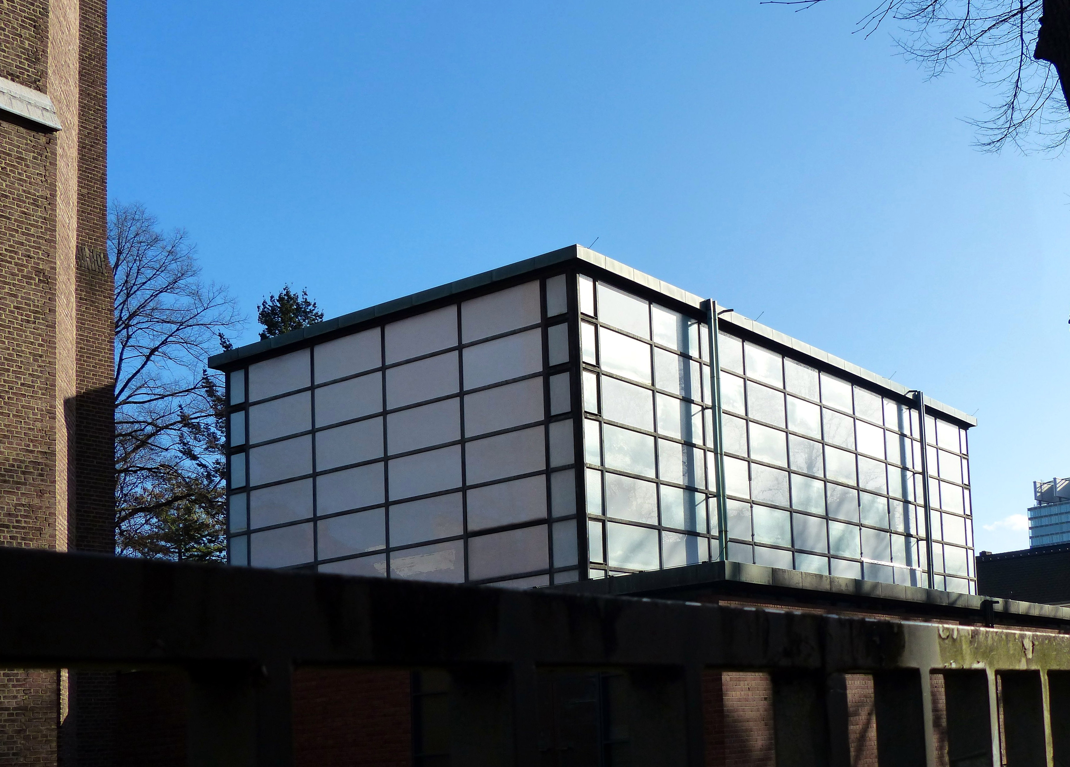 Neubau Kirche St. Stephan Köln-Lindenthal (1960/61), Architekt: Joachim Schürmann